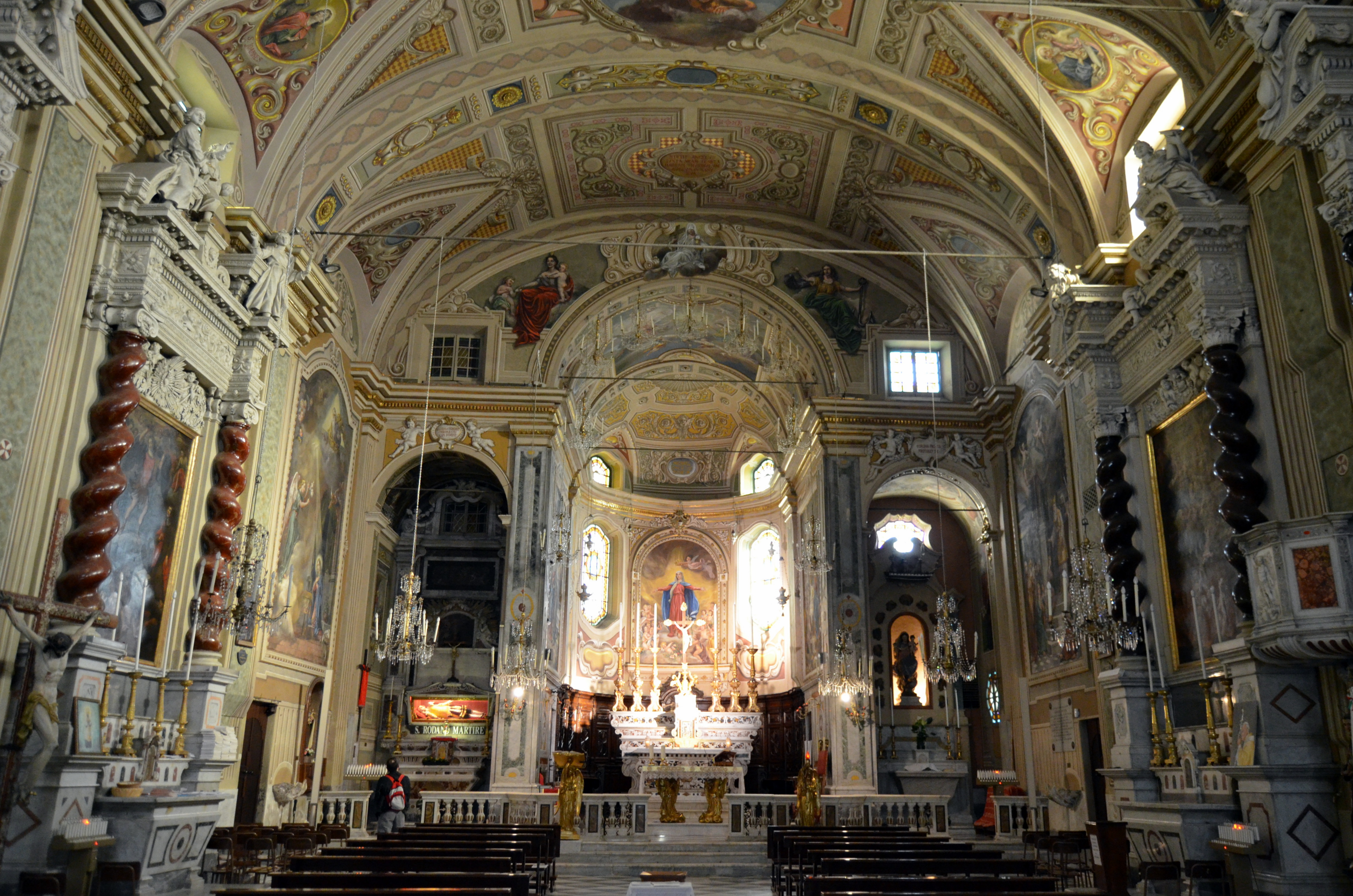 Interno della navata della chiesa di San Michele Arcangelo, Pieve Ligure, Liguria, Italia